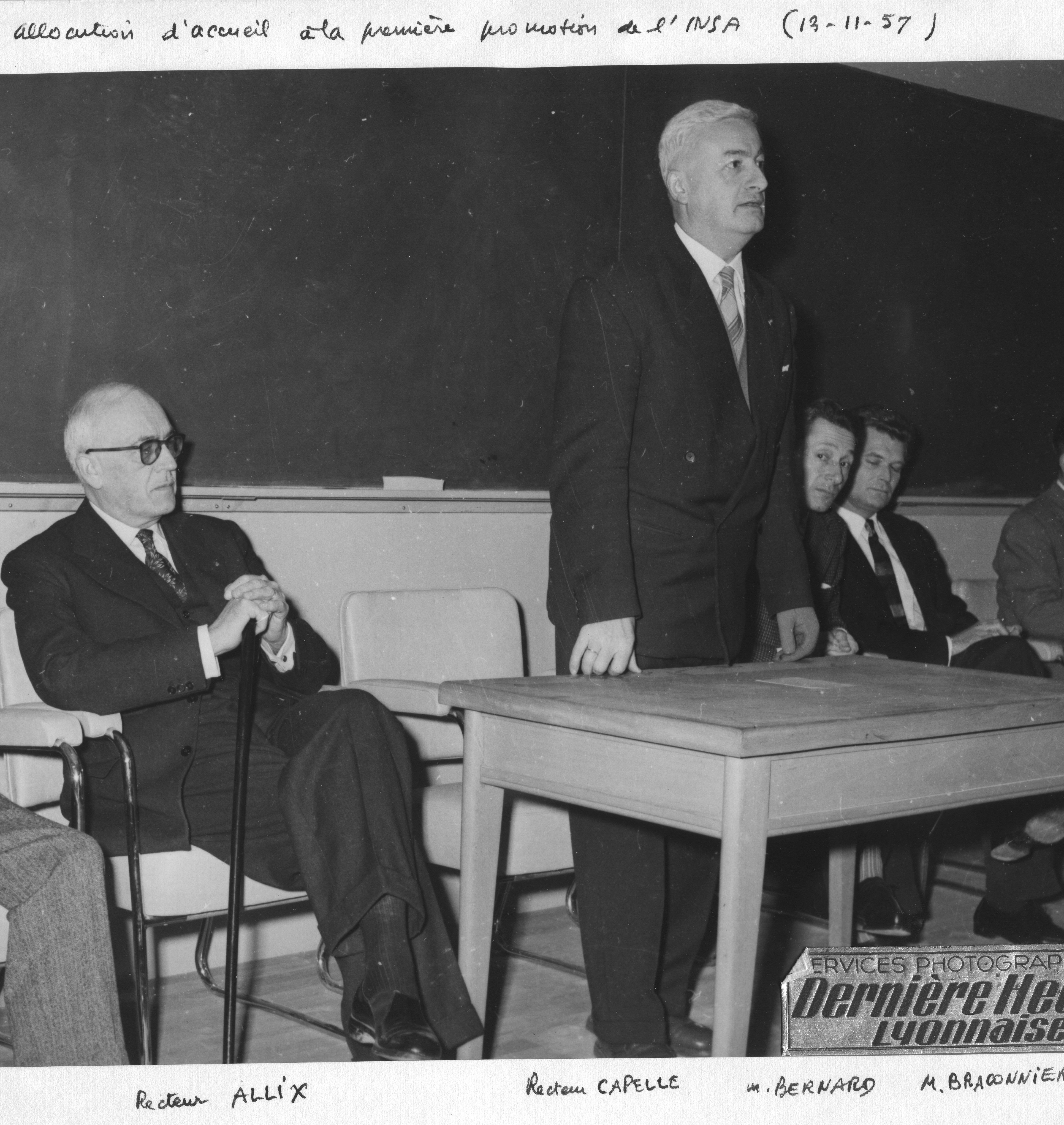 Recteur Jean Capelle : Conférence d'accueil de la première promotion de l'INSA de Lyon le 13 novembre 1957 en présence du Recteur Allix.